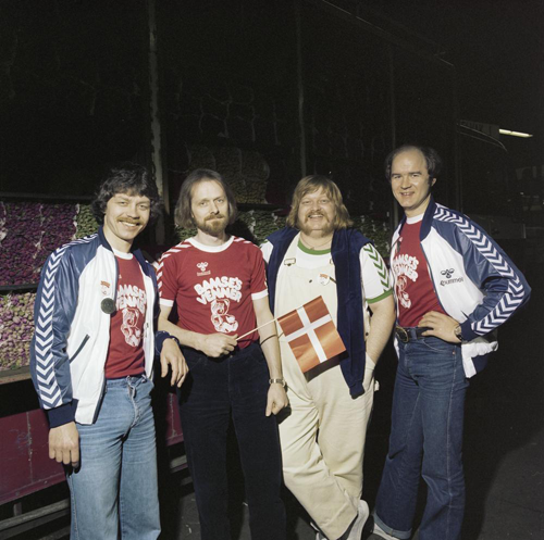 De Deense groep Bamses Venner tijdens een fotosessie voor het Eurovisie Songfestival 1980